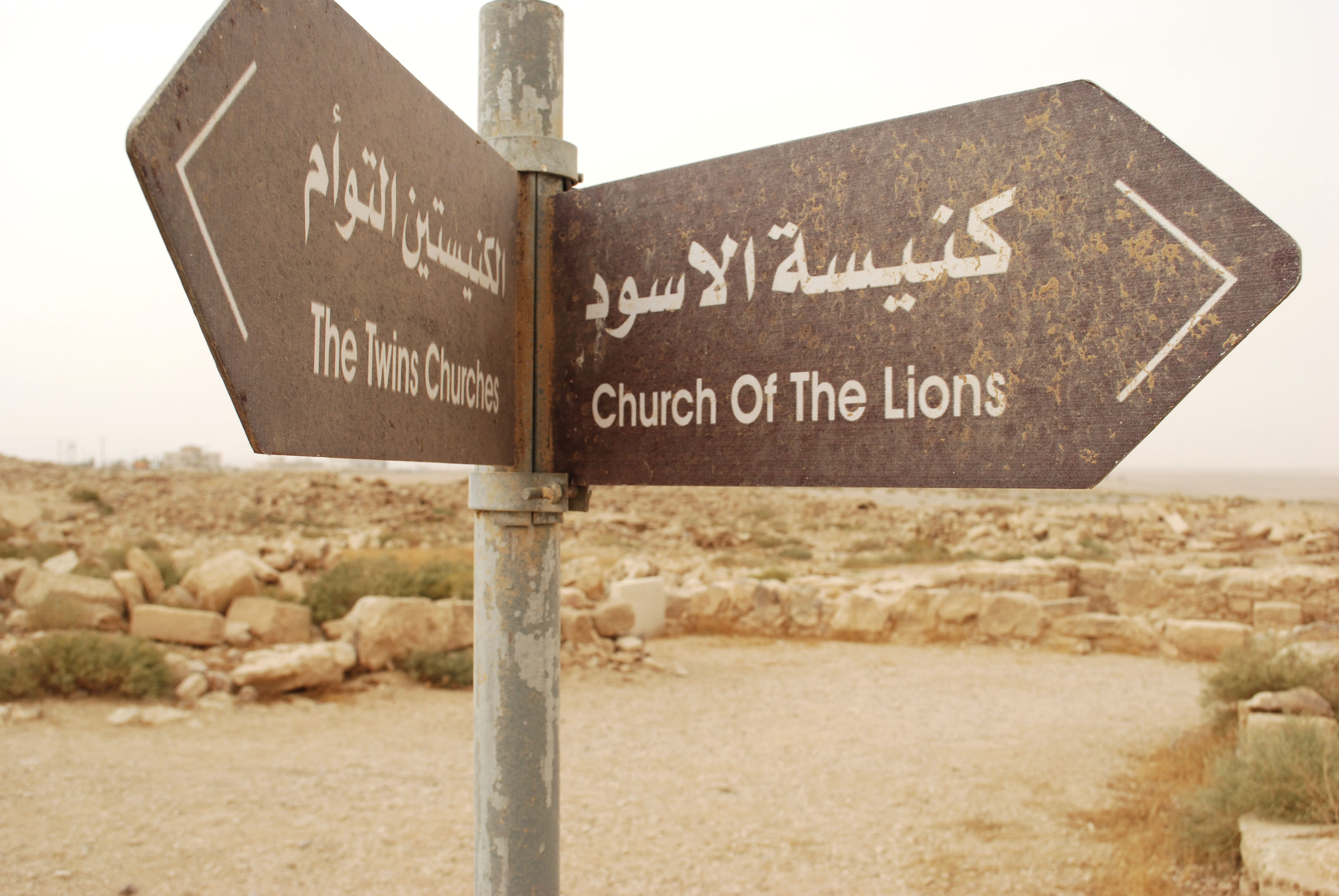 Vue des vestiges de la ville de Umm ar-Rasas.